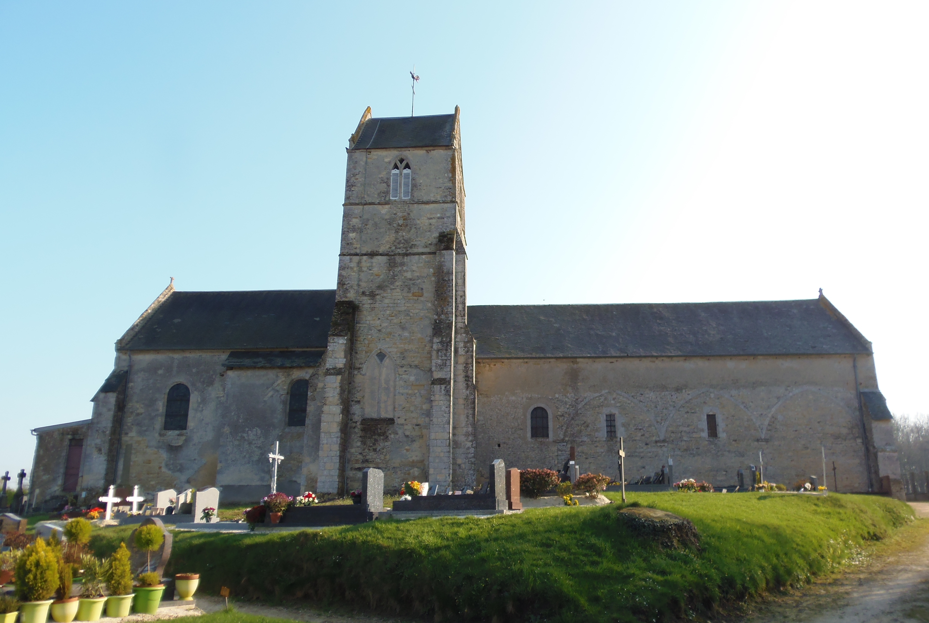 Trungy (Normandie, France). L'église Saint-Vigor .